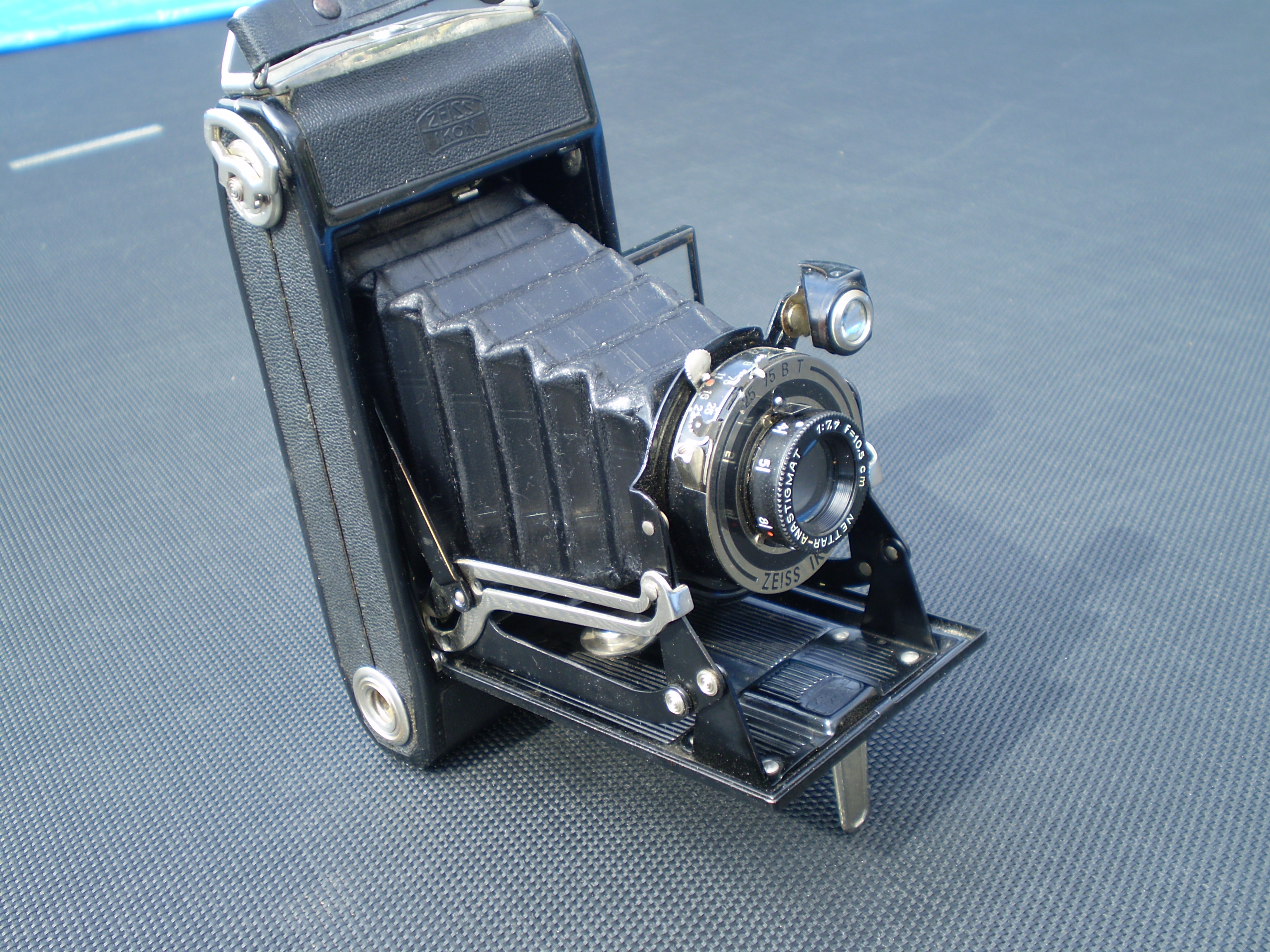 Zeiss Ikon Compor